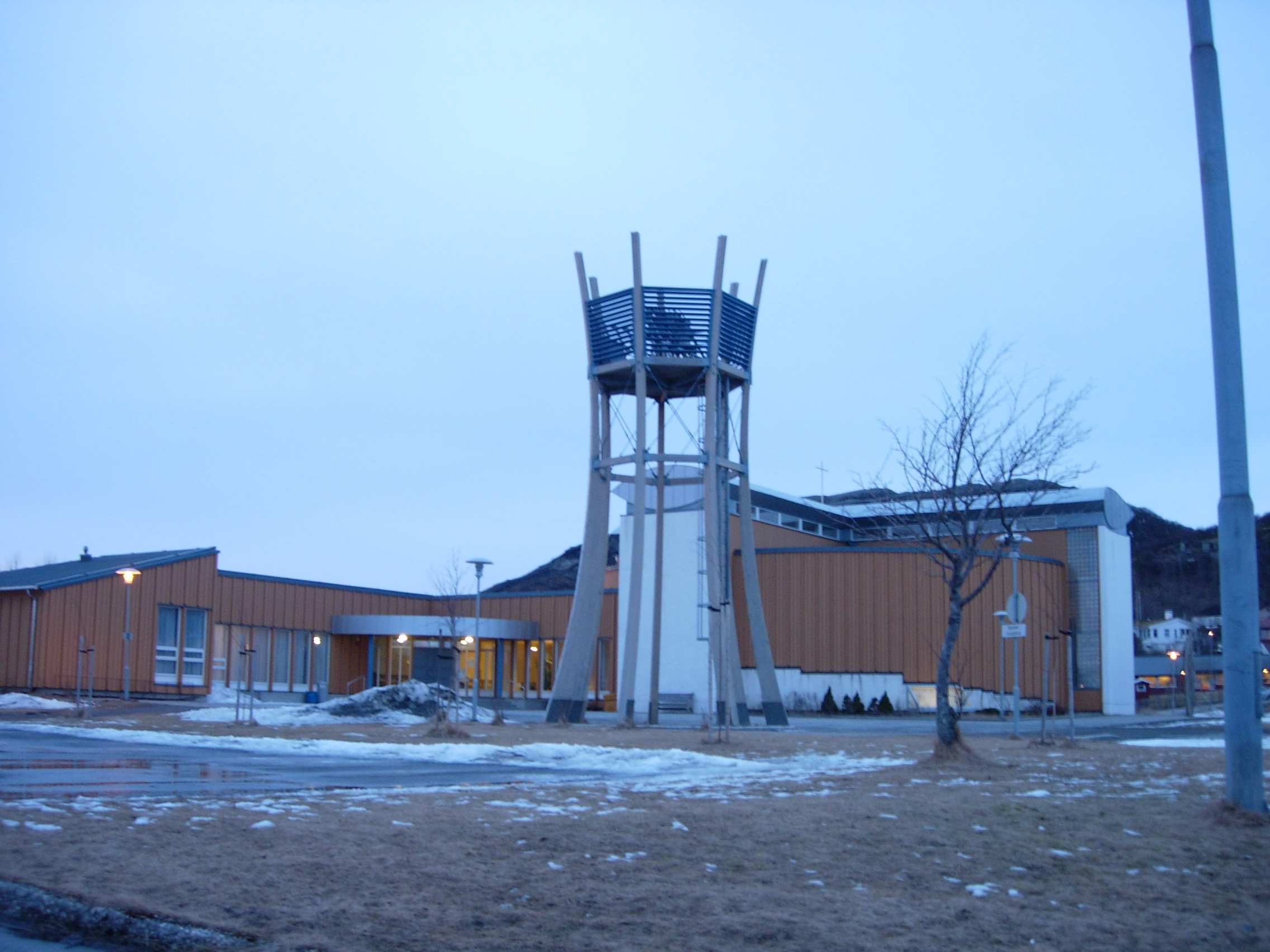 Rønvik kirke / Rønvik church